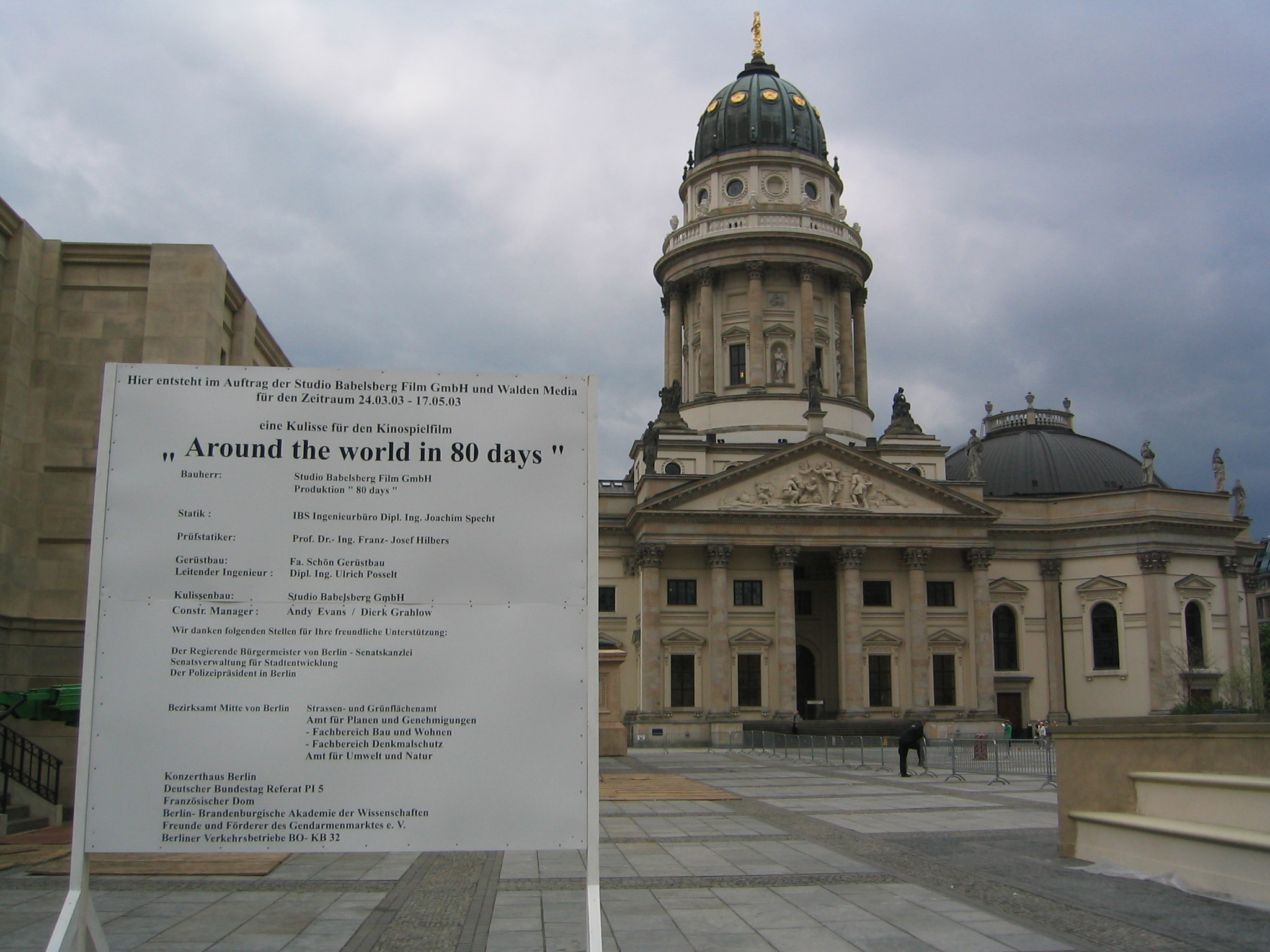 Tournage du film Le Tour du monde en 80 jours au Gendarmenmarkt à Berlin (Französischer Dom, censé représenter la Bourse de Londres)